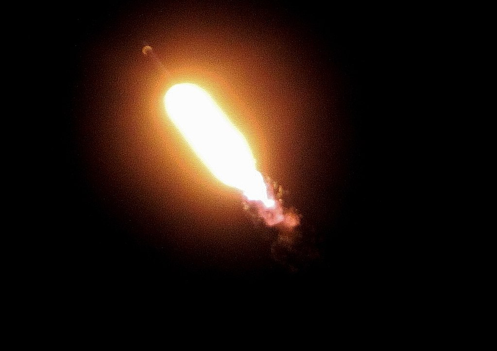 El cohete SpaceX Falcon 9 que transporta el satélite de comunicaciones SES-8 se lanza desde Cabo Cañaveral SLC-40.